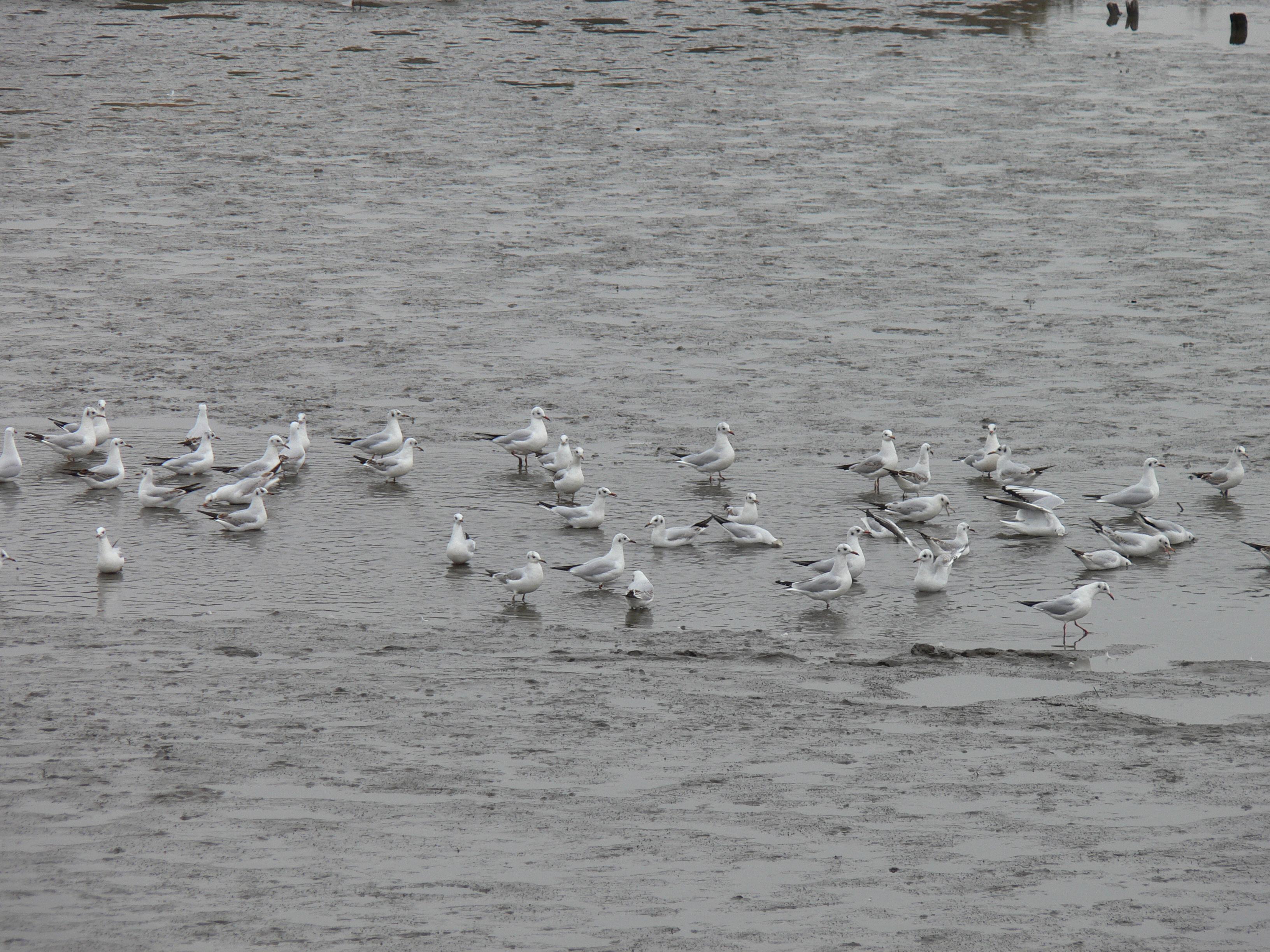 fotografie výlovů rybníka